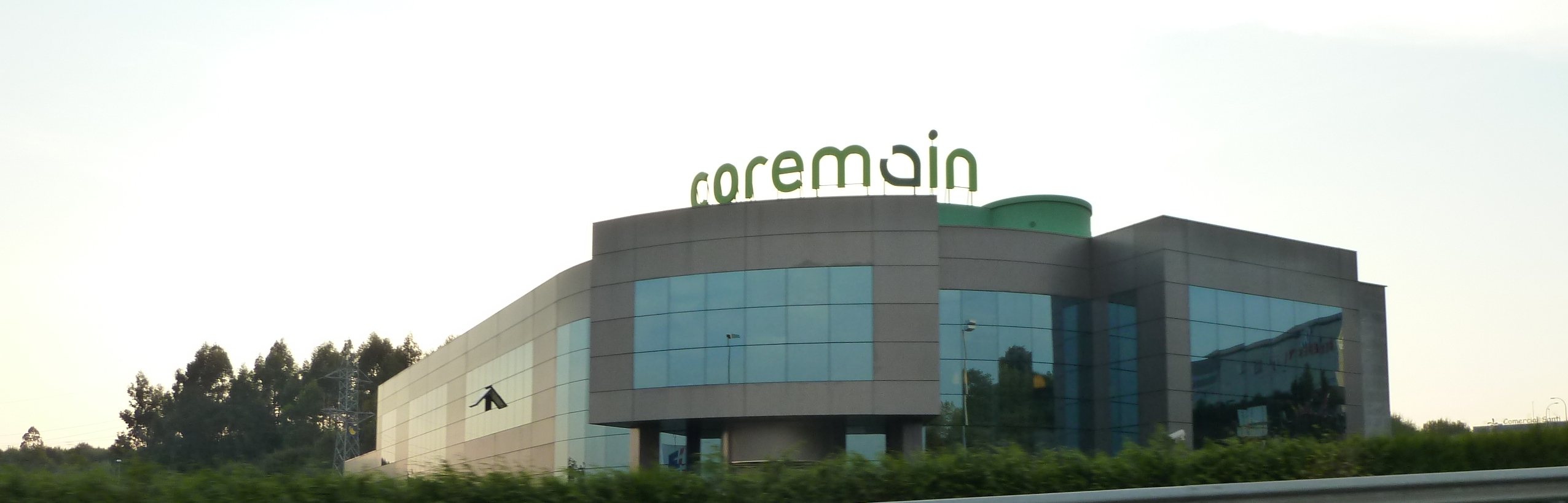 Edificio de Coremain en Santiago de Compostela, Galicia.